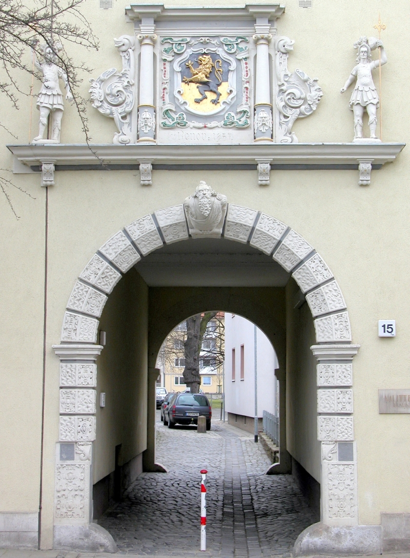 Renaissance-Portal aus dem Jahre 1619 am östlichen Eingang in die Opfertwete von der Reichsstraße.